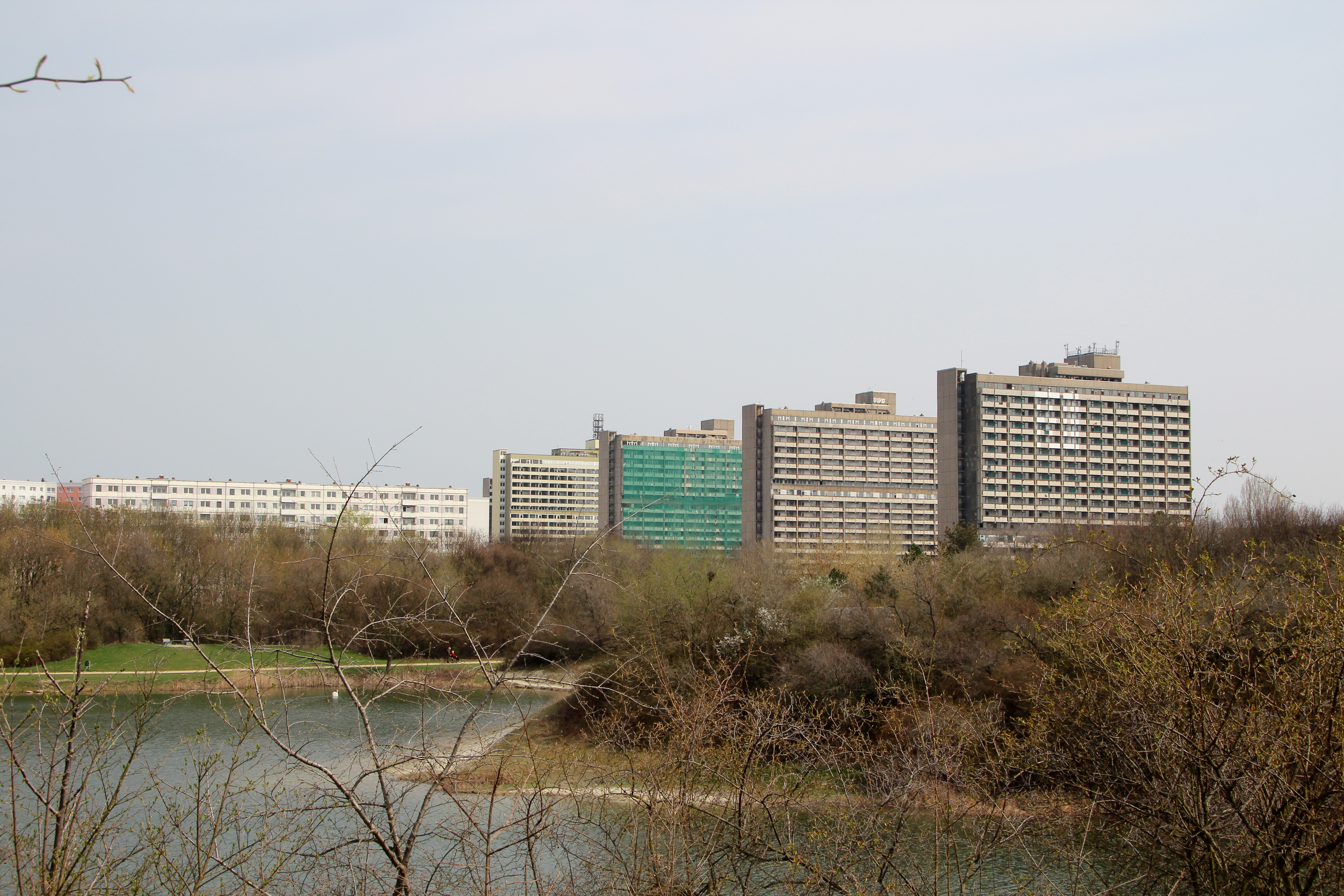 Halle (Saale) ist eine Stadt in Deutschland in Sachsen-Anhalt.